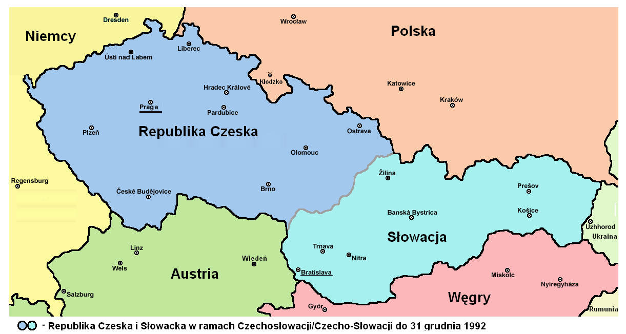 Czecho-Słowacja do podziału w 1992